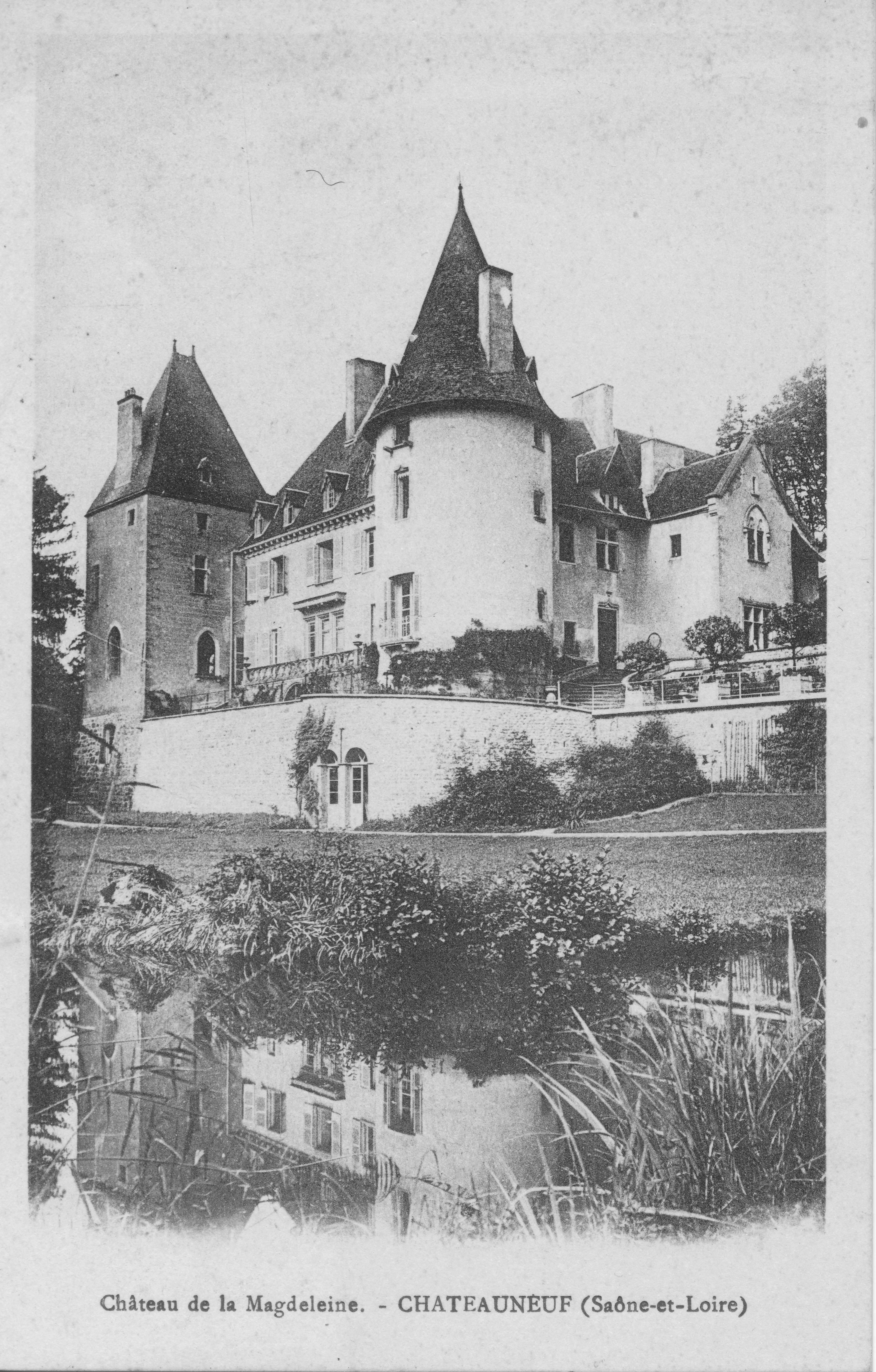 Carte postale, Château de la Magdeleine, Chateauneuf, Saône et Loire, avant 1935